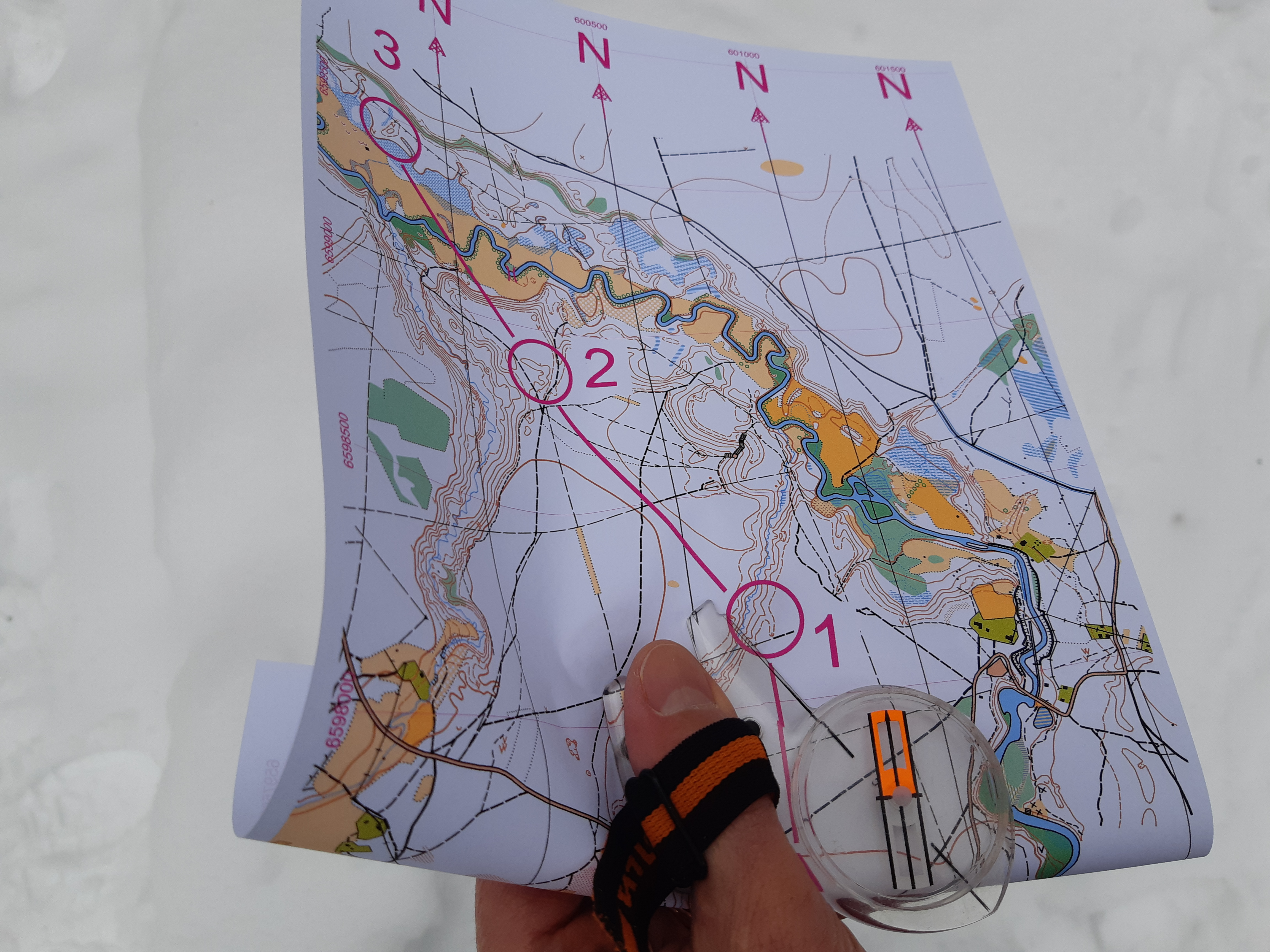 Pöidlakompass ja orienteeritud kaart